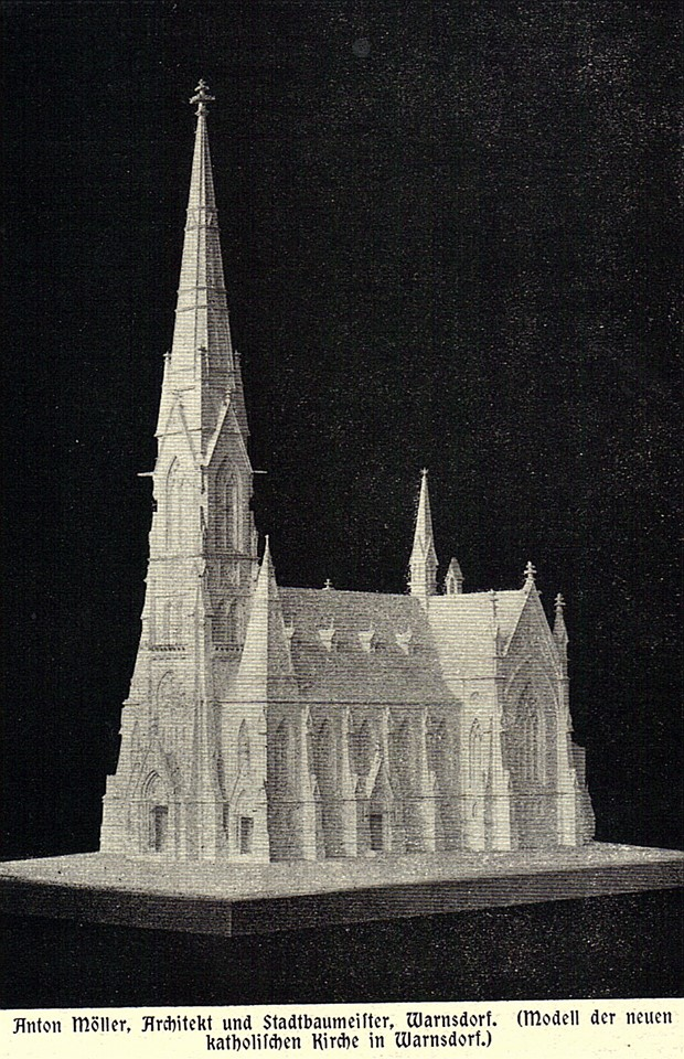 Model katolického kostela sv. Karla Boromejského ve Varnsdorfu z roku 1906 představeného na německočeské výstavě v Liberci